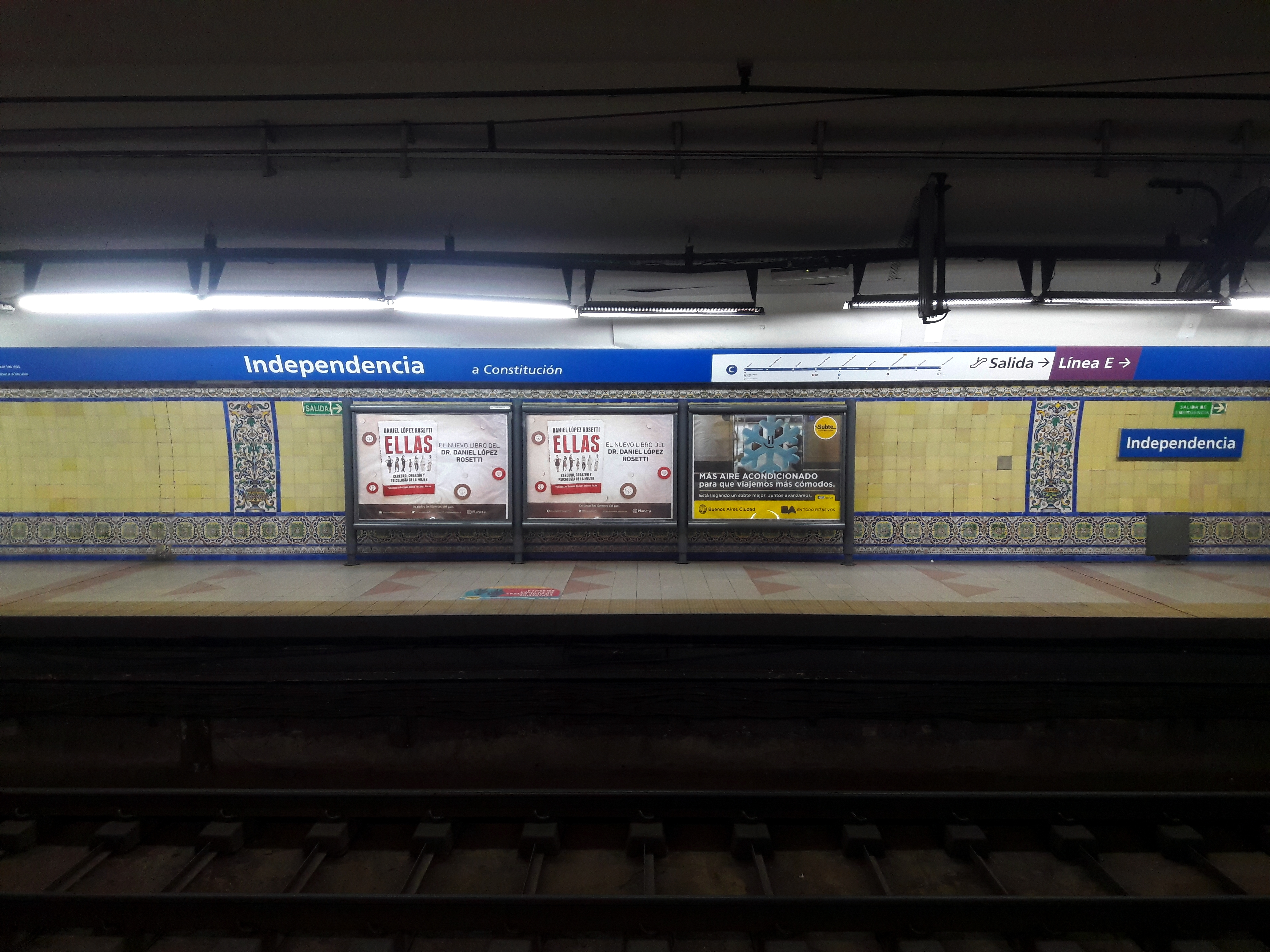 Subte de Buenos Aires